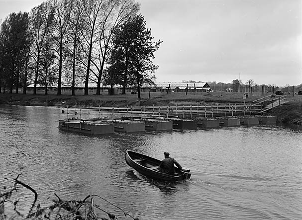 Teitl Cymraeg/Welsh title: Badbont ar draws yr Hafren yn Amwythig Ffotograffydd/Photographer: Geoff Charles (1909-2002) Dyddiad/Date: 1/5/1950 Cyfrwng/Medium: Negydd ffilm / Film negative Cyfeiriad/Reference: (gch00509) Rhif cofnod / Record no.: 3367369 Rhagor o wybodaeth am gasgliad Geoff Charles yn Llyfrgell Genedlaethol Cymru More information about the Geoff Charles Collection at the National Library of Wales Mae ffotograffau Geoff Charles hefyd yn rhan o Broject Europeana Libraries Geoff Charles' photographs also form part of the Europeana Libraries Project